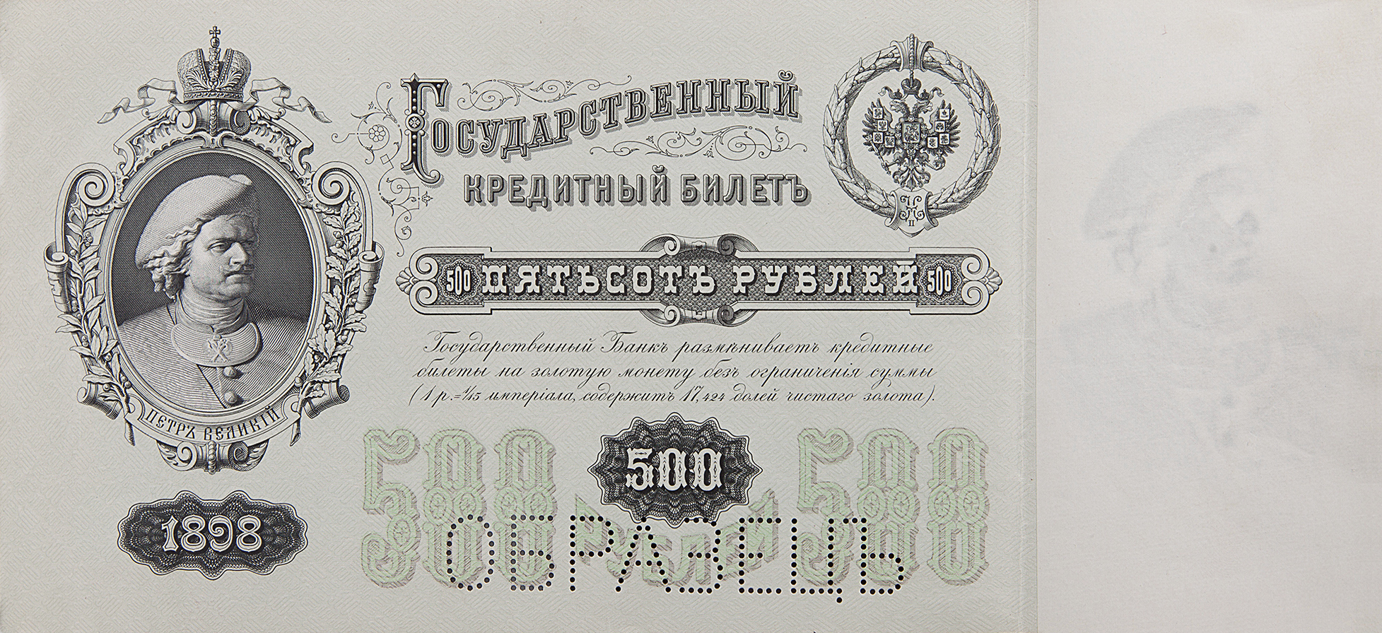 500 рублей 1898 года. Аверс. Пётр Первый